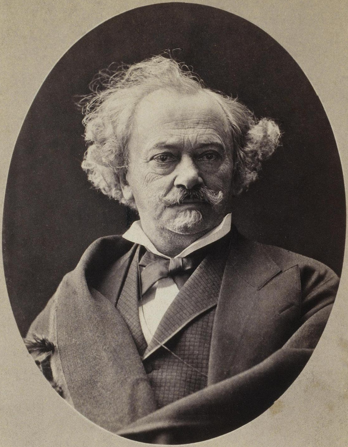 Портрет актера Василия Васильевича Самойлова. Фотография: альбуминовый отпечаток